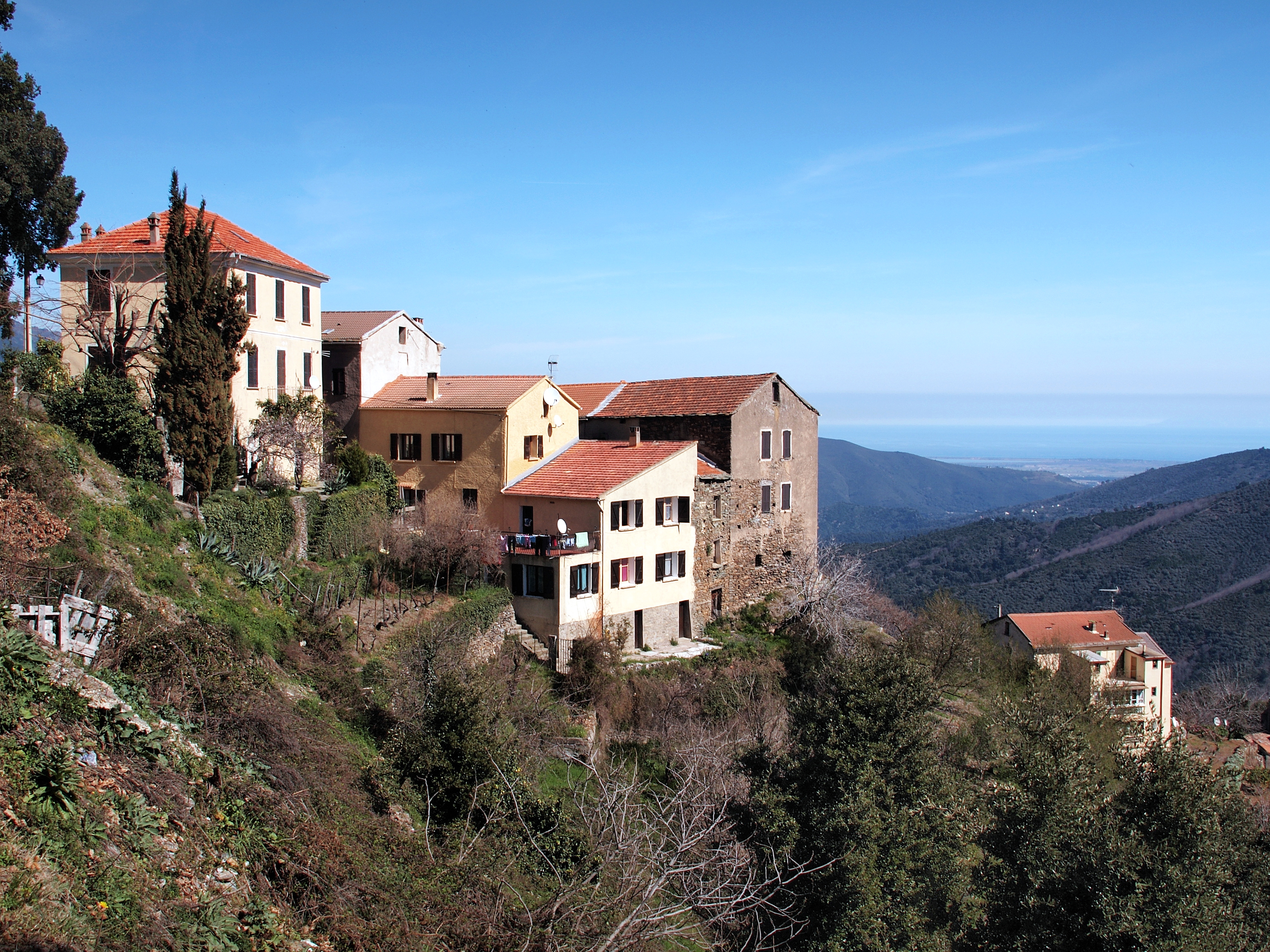 Campile, Castagniccia (Corse) - Hameau de Vergagliese